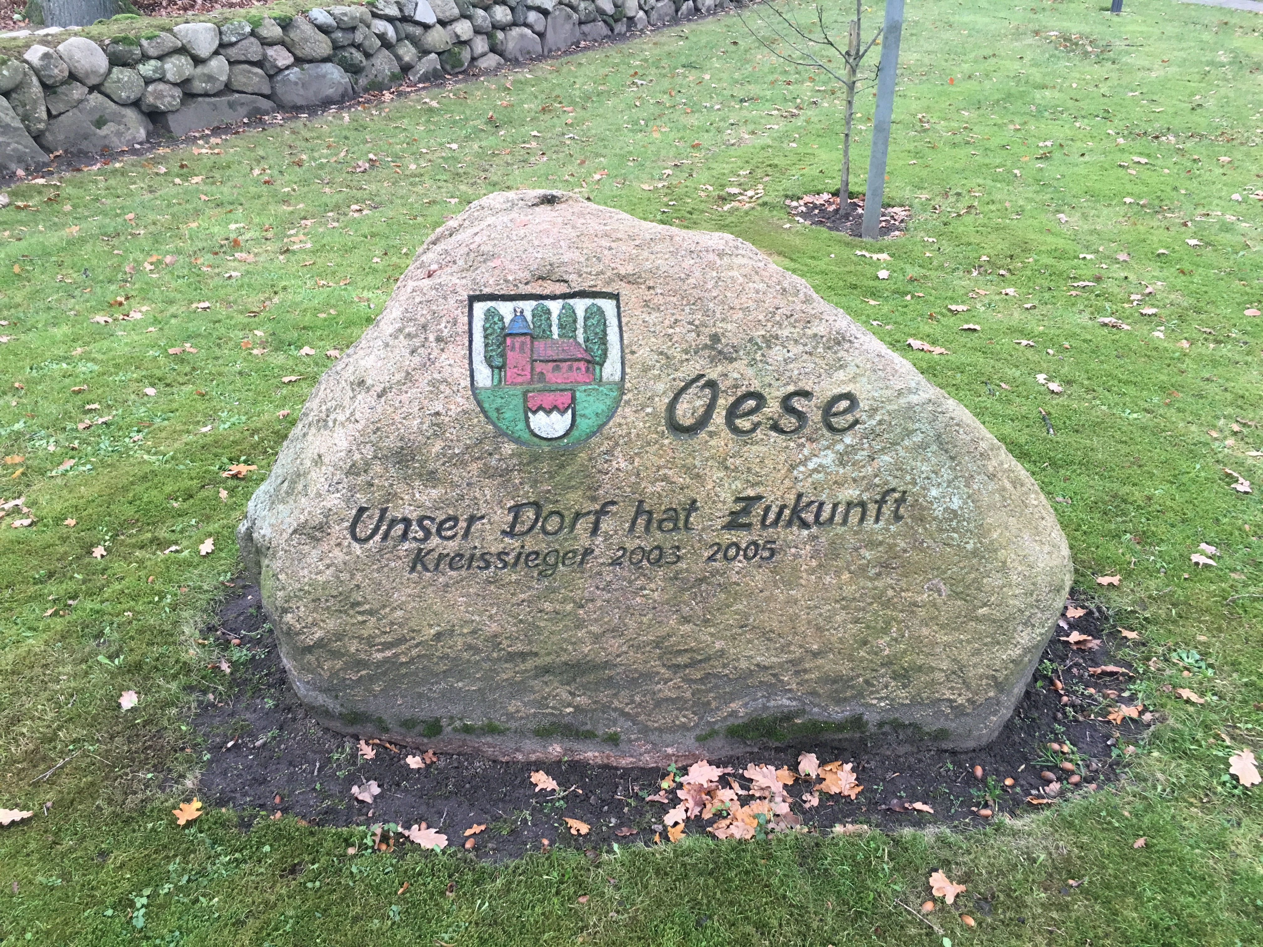 Gedenksteen Uns Dörp hett Tokumst in Öös Text: Oese. Unser Dorf hat Zukunft. Kreissieger 2003 2005